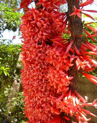 Ixora margaretae (N.Hallé) Mouly & B.Bremer (syn. Captaincookia margaretae N.Hallé), arbre à fleur endémique de la forêt sèche